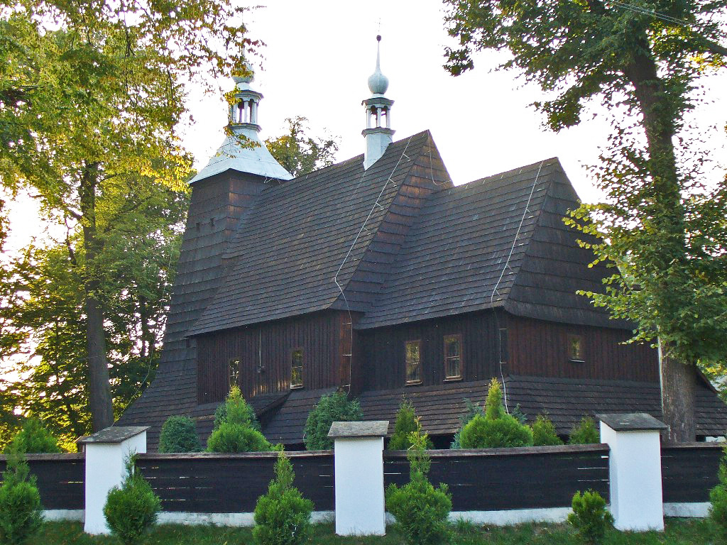 Drewniany Kościół w Grzawie.